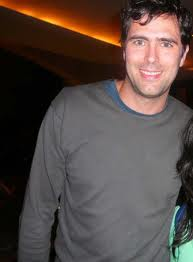 tim rice-oxley